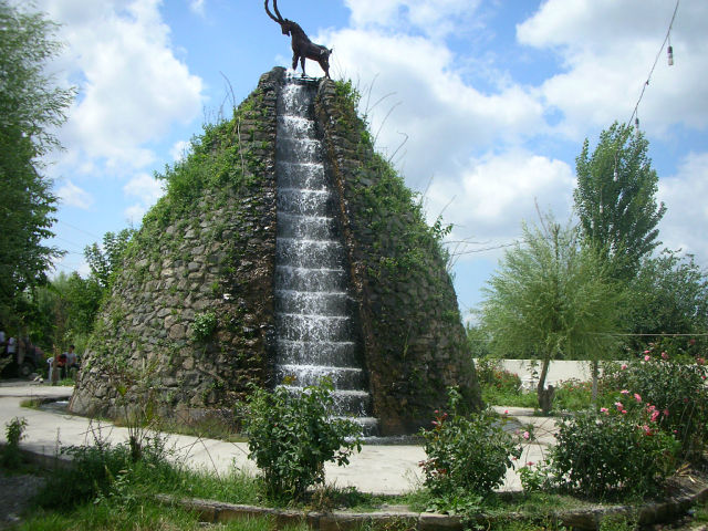 Bərdə rayonu Yeni Daşkənd kəndinin girişində, Bərdə-Tərtər yolu üzərində şəlalə